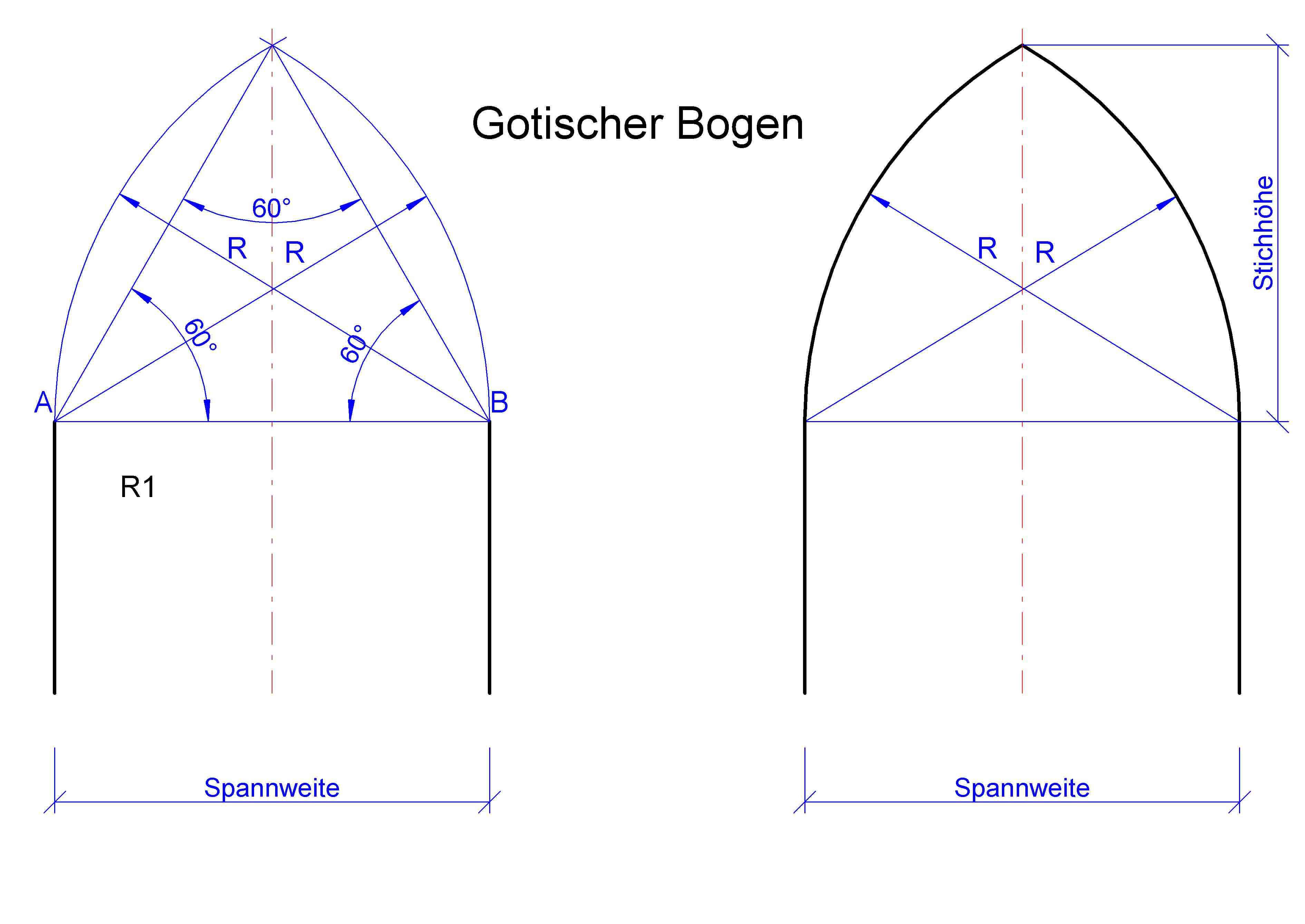 Gotischer Bogen Konstruktion